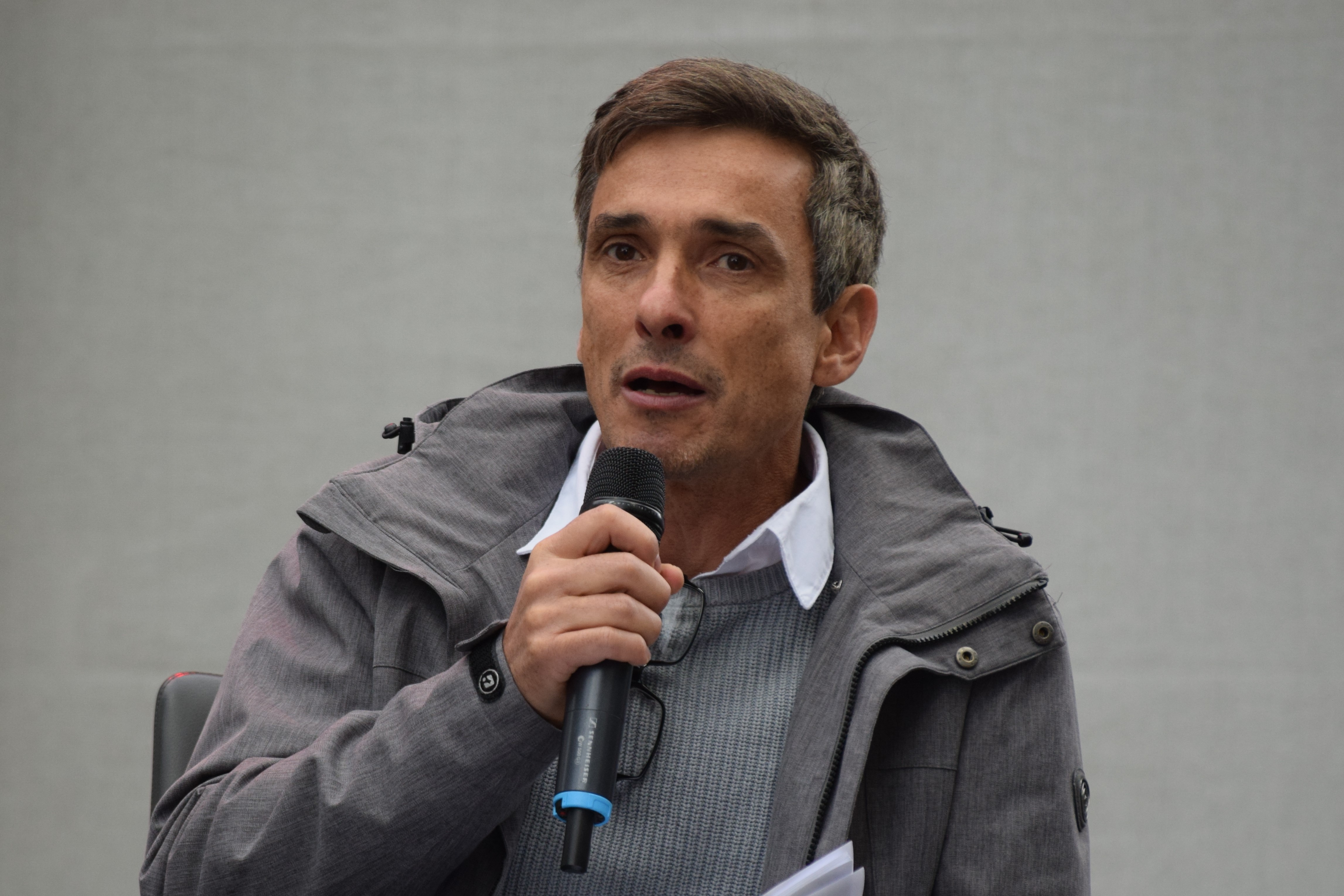 Raul Zelik auf dem Fest der Linken 2018. Rosa Luxemburg Platz, Berlin. Samstag 23.06.2018.